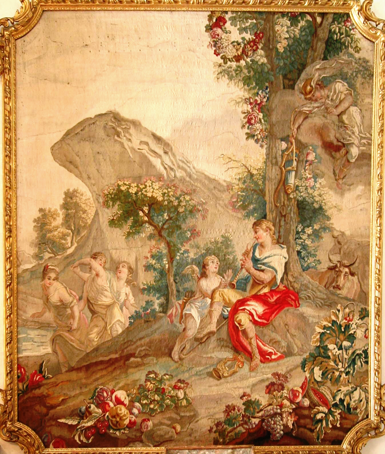 Tapisserie en laine et soie de la manufacture royale d'Aubusson milieu du XVIIIe siècle. L'éducation d'Apollon d'après un carton de Coypel. Musée Grobet-Labadié à Marseille.